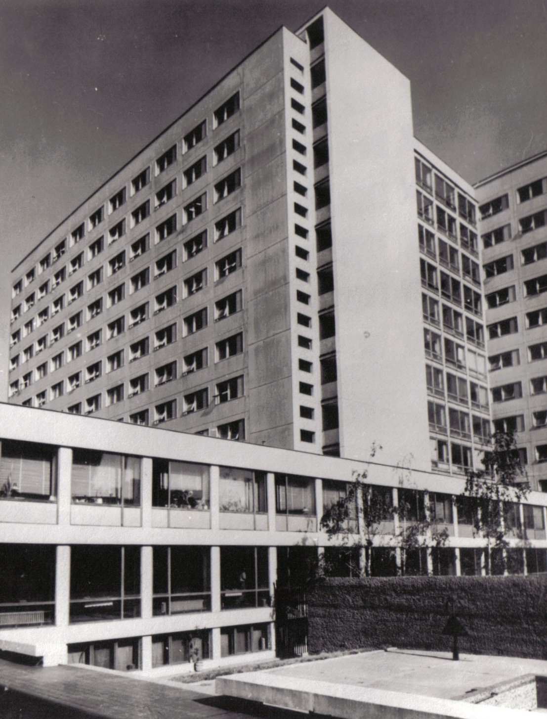 Študentský domov Jura Hronca (1960 – 1967)